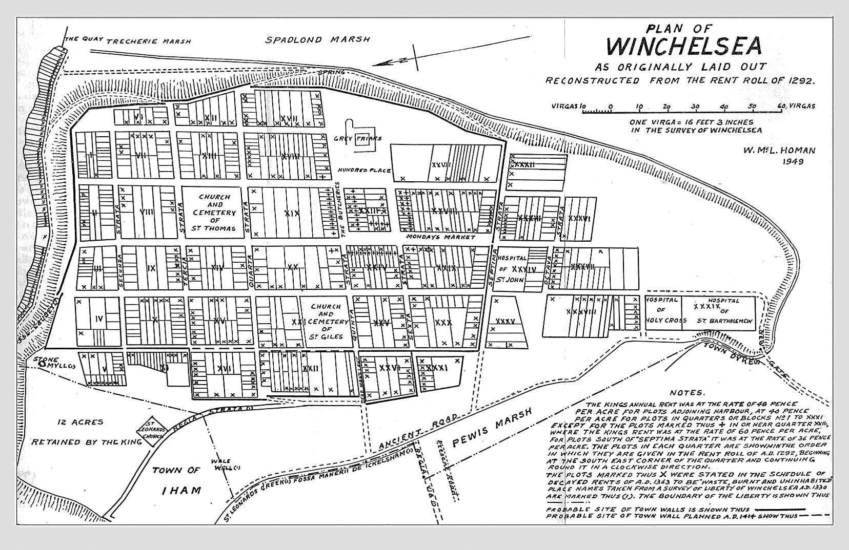 Premier exemple de nomenclature urbaine alphanumérique, lors de la reconstruction de Winchelsea sur un plan à damier en 1288